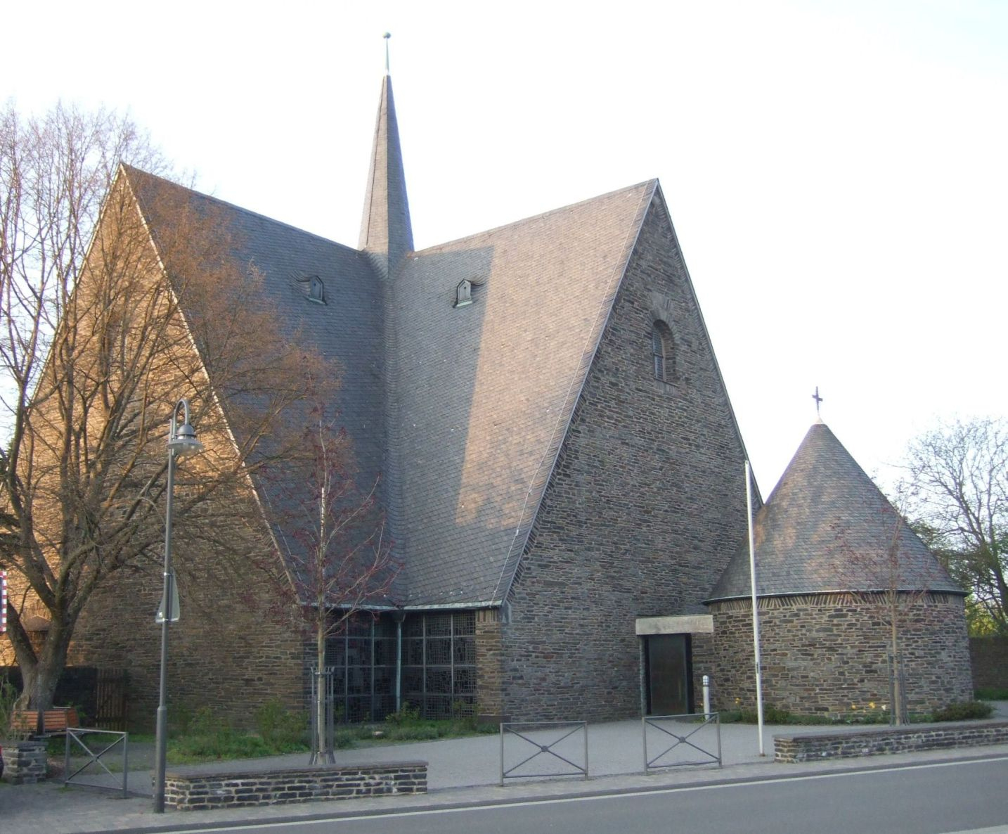 Thomm, Landkreis Trier-Saarburg, neue Kirche